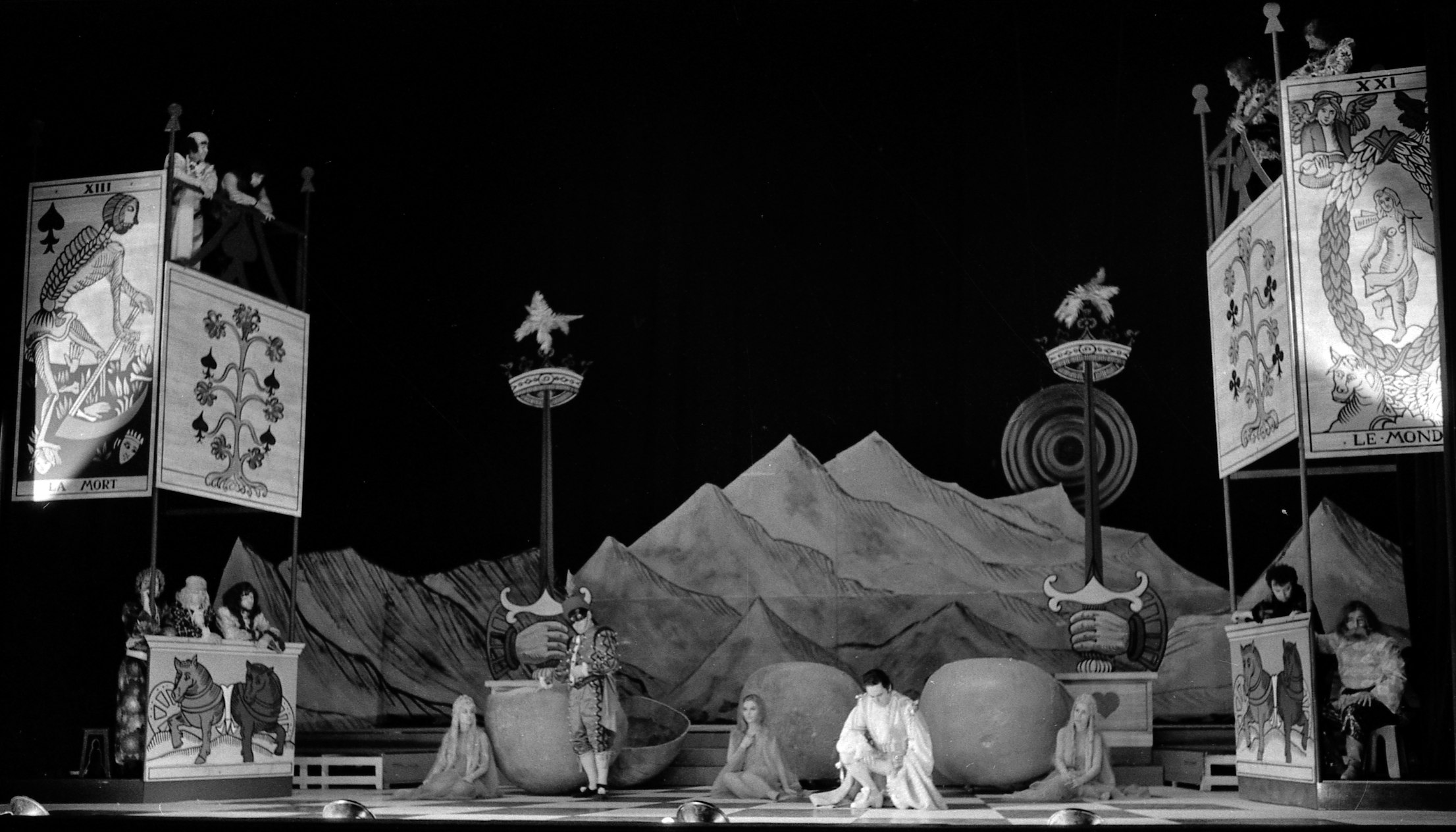 Théâtre du Capitole. Le 25 Février 1971. Vue de la représentation de L'amour des trois oranges au théâtre du Capitole.